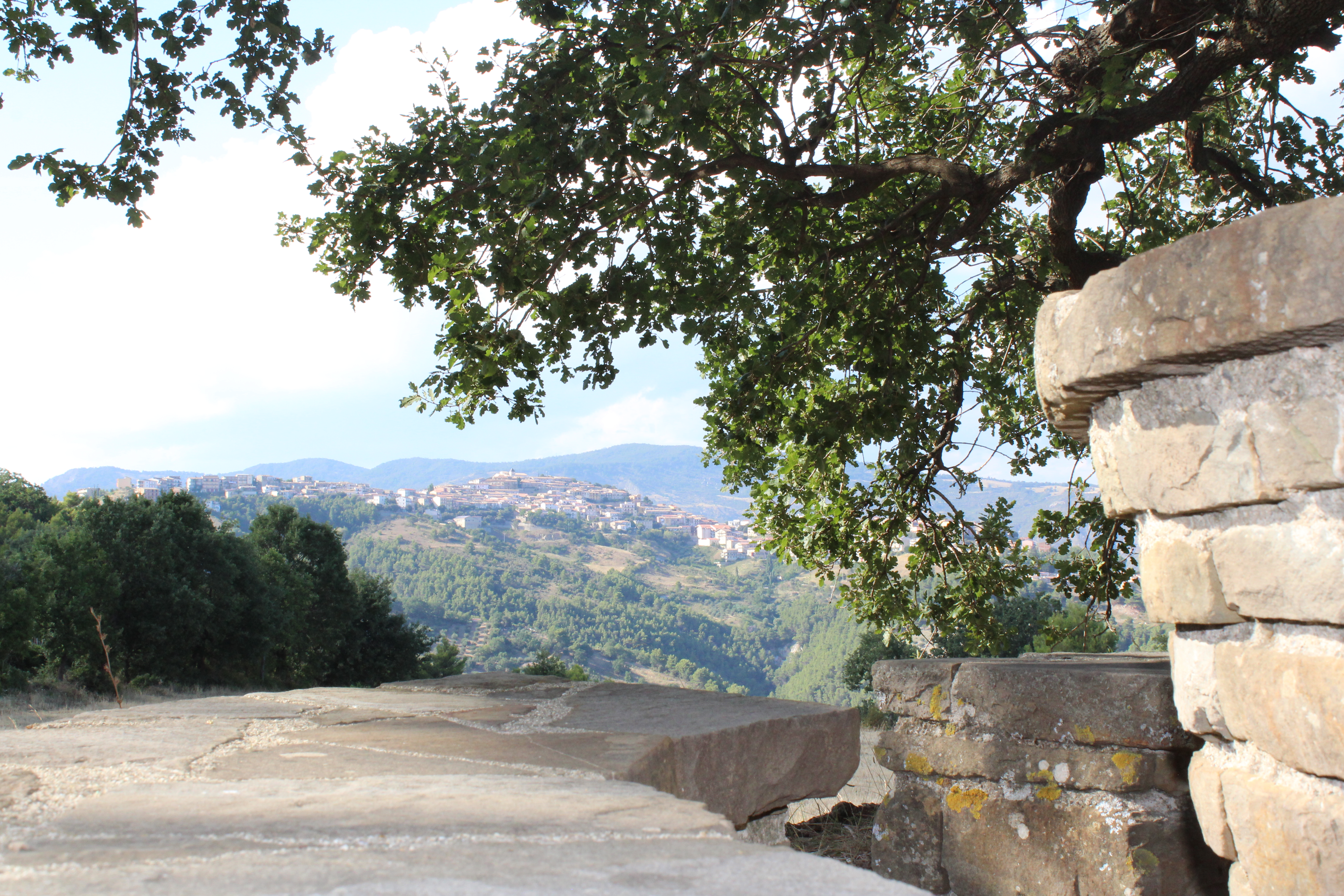 Mastimaiore con Albidona sullo sfondo